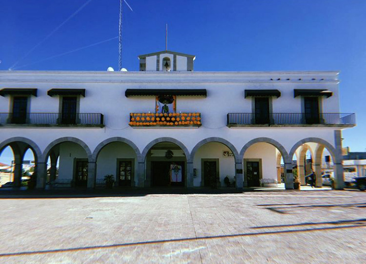 Presidencia Municipal de Ojinaga, Chihuahua.